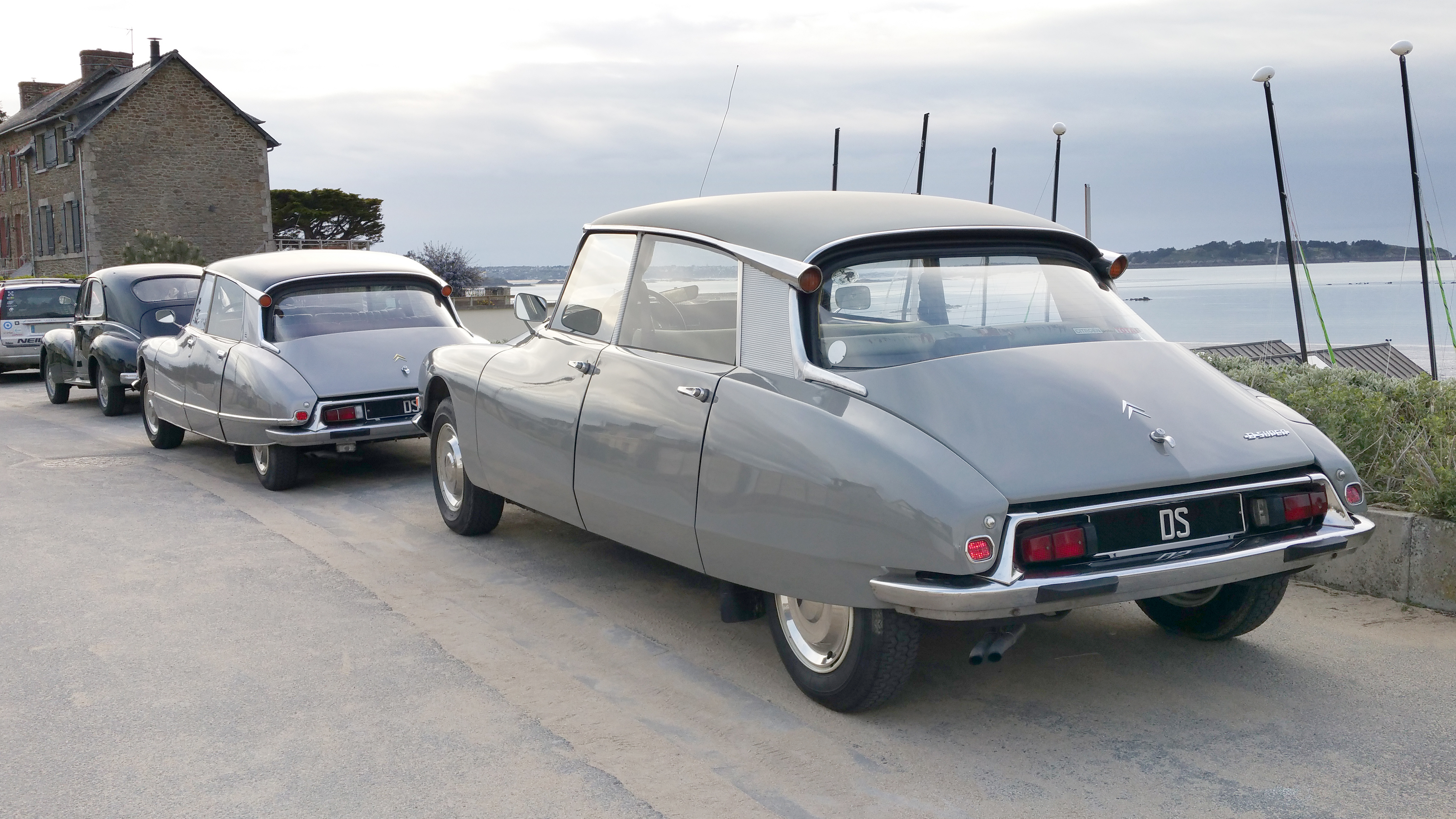 Un superbe lot d'anciennes voitures françaises : une Peugeot 203, une Citroën DS 20 et une Citroën DS Super.